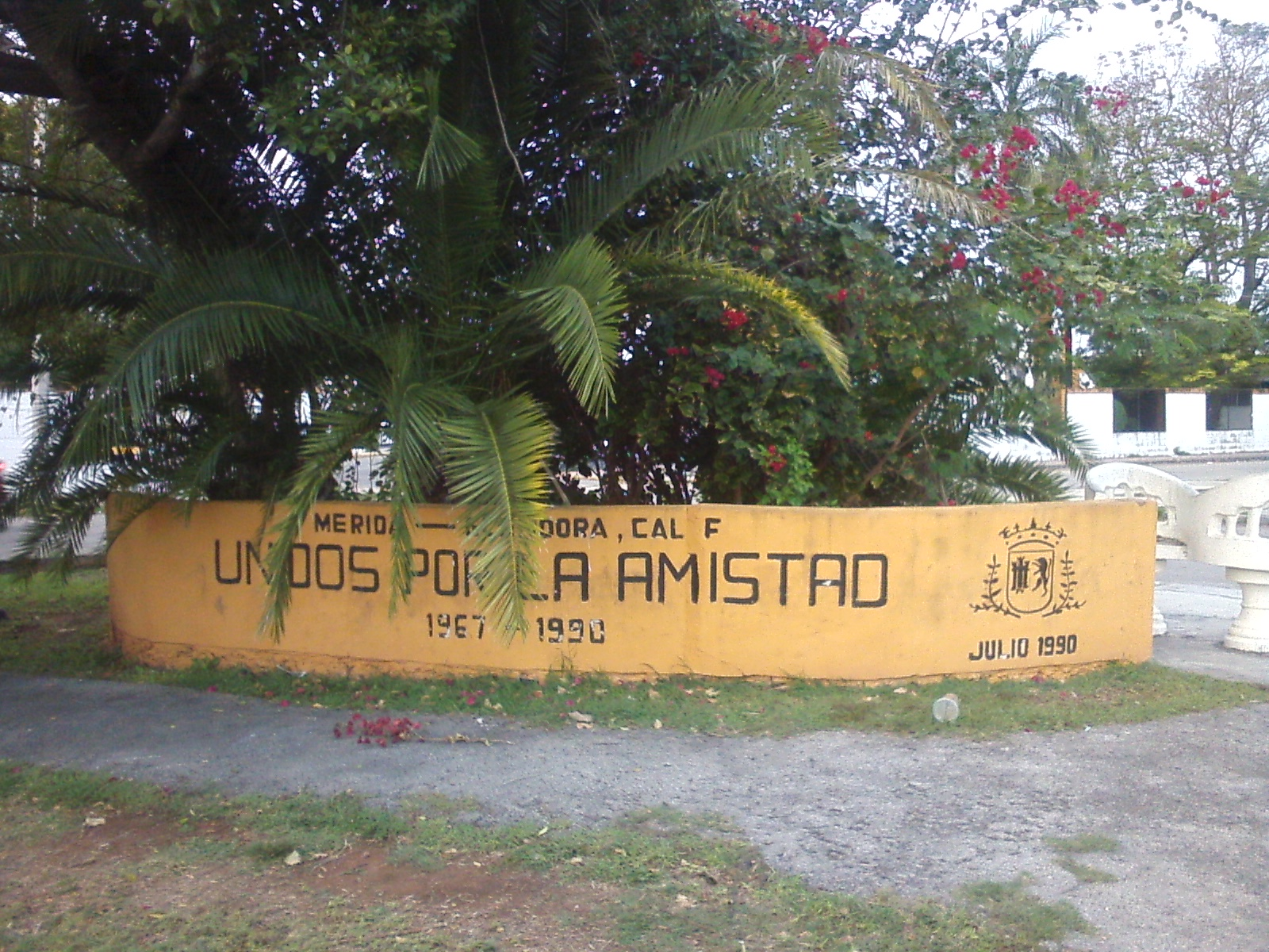 Parque de la Amistad, conmemorativo del hermanamiento de Glendora, California y Mérida, Yucatán.